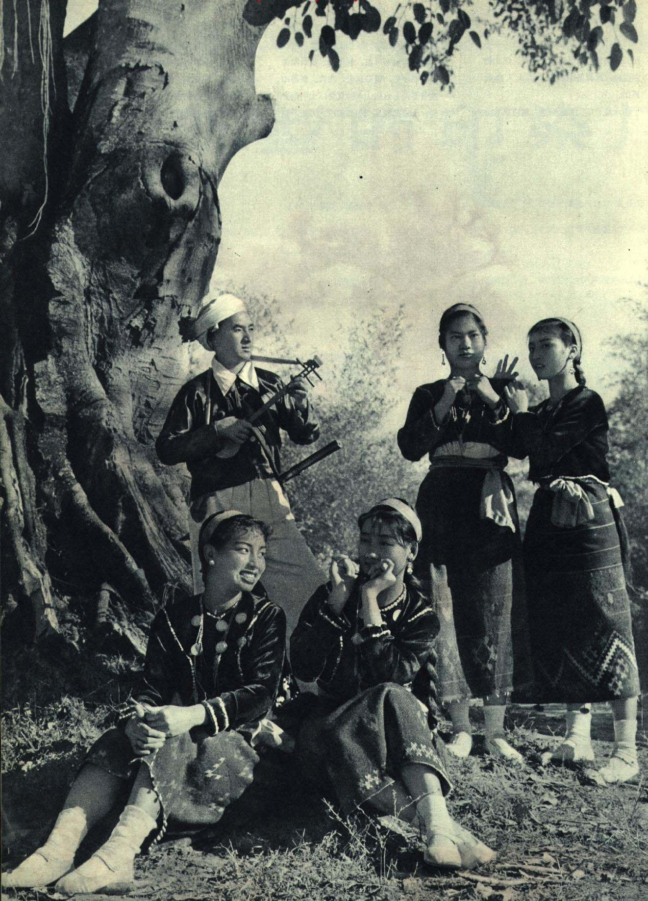 1962-07 1962年 景颇族歌手